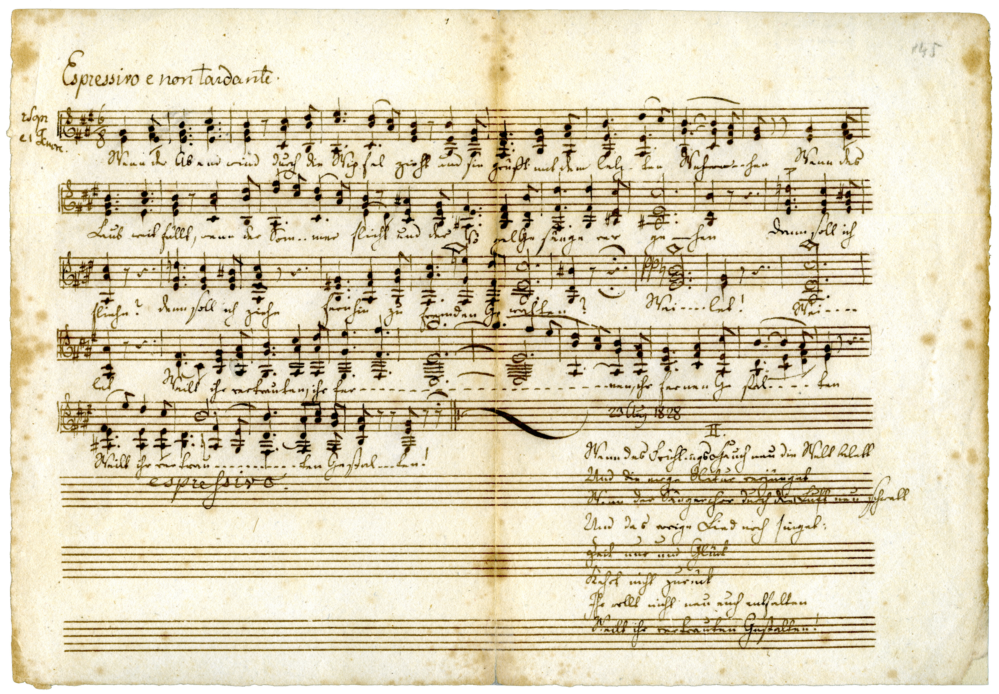 Felix Mendelssohn Bartholdy: „Wenn der Abendwind durch die Wipfel …“, Autograph des 3stimmigen Liedes